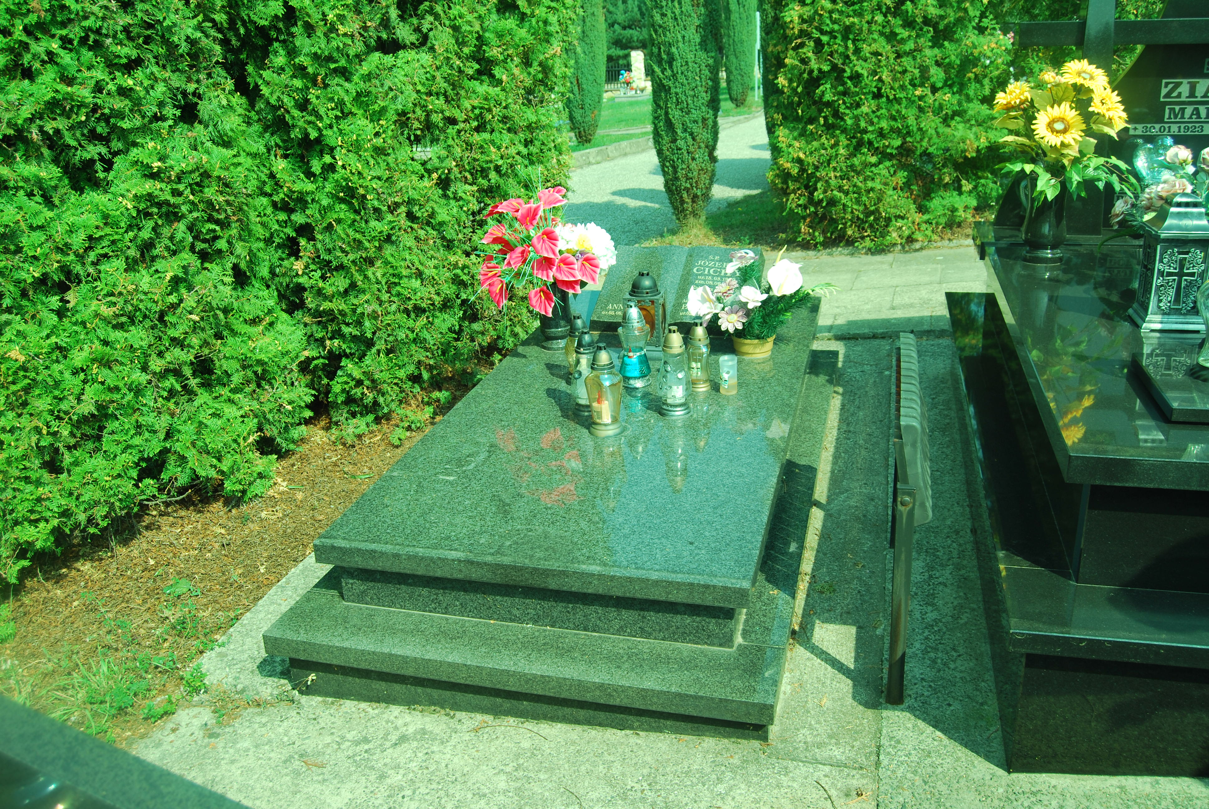 Józef Cichy (ur. 16 marca 1920 , zm. 8 czerwca 2015).Grób , Cmentarzu w Myślachowicach 2018.